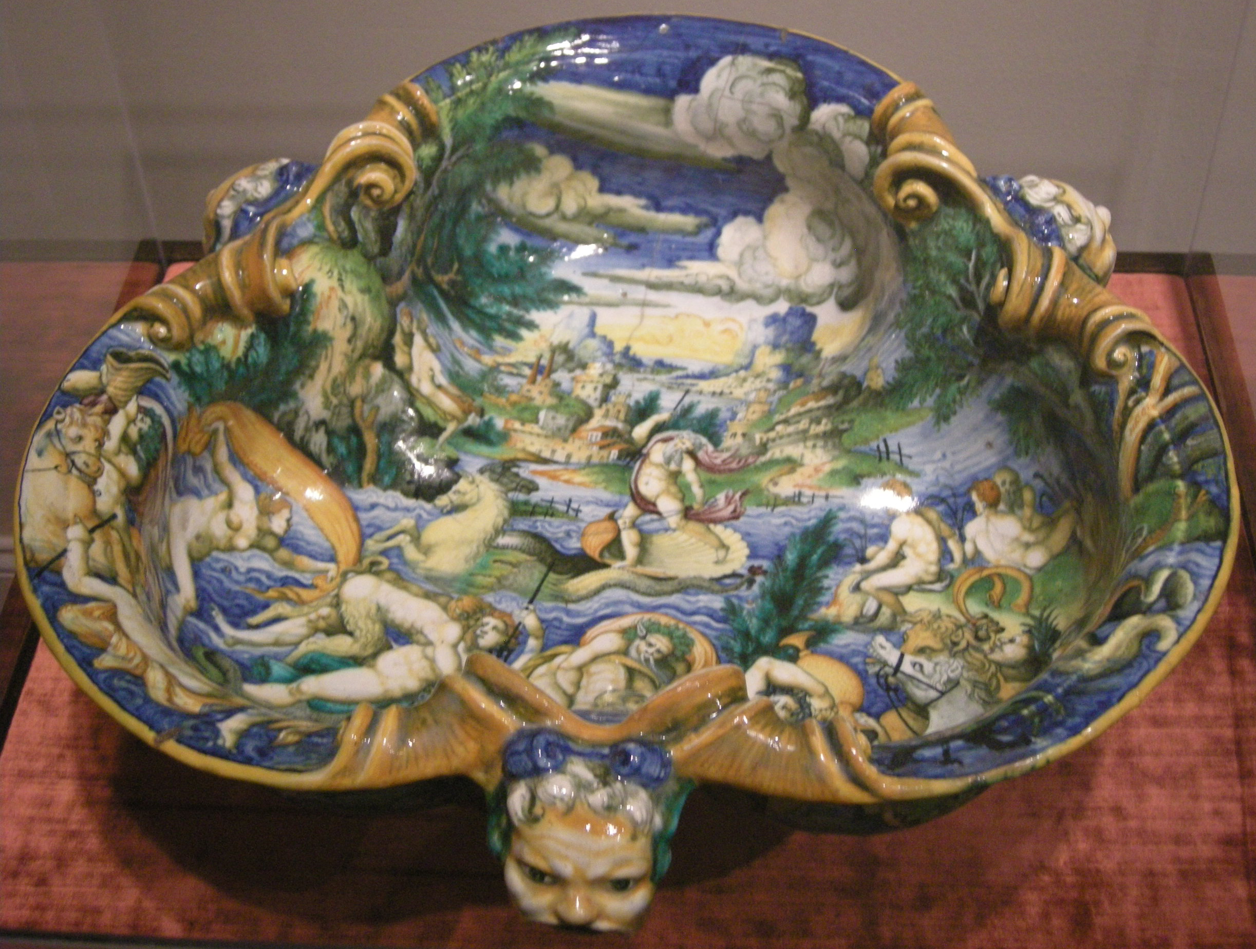 Orazio fontana (bottega, bacinella per vino, 1565-71 ca.